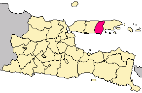 Locator kabupaten pamekasan